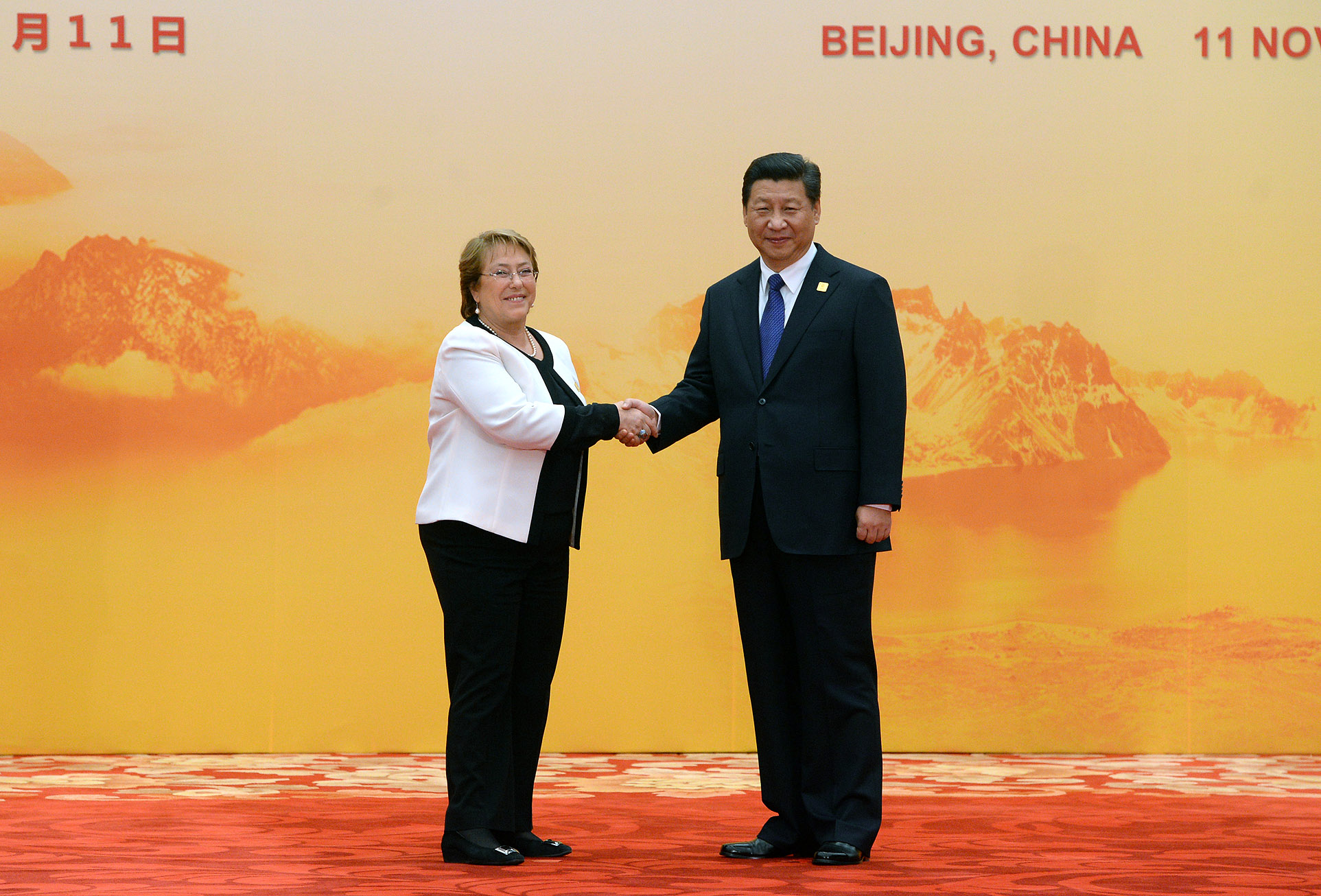 Gobierno de Chile